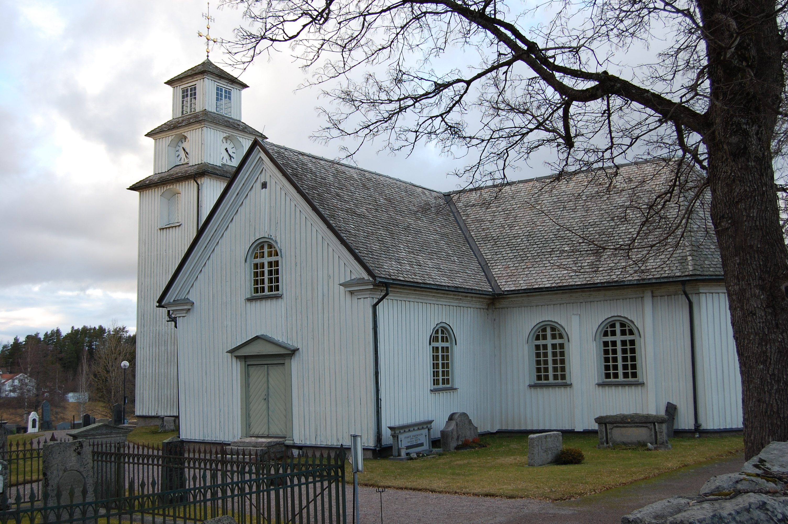 Kyrka